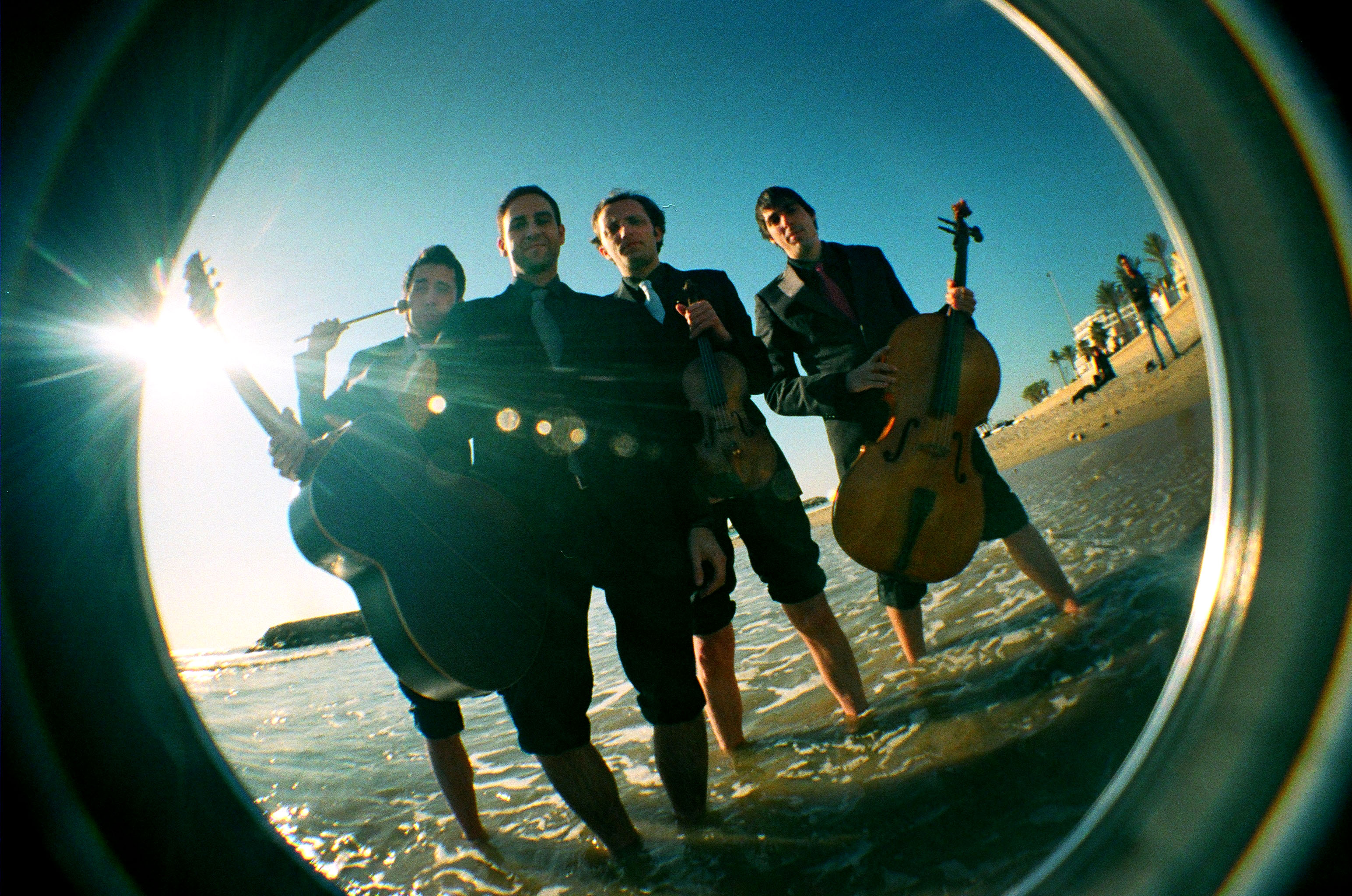 Foto dels Blaumut en ull de peix